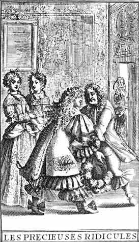 Frontispiece of Molière's Les Précieuses ridicules, edition of 1682.